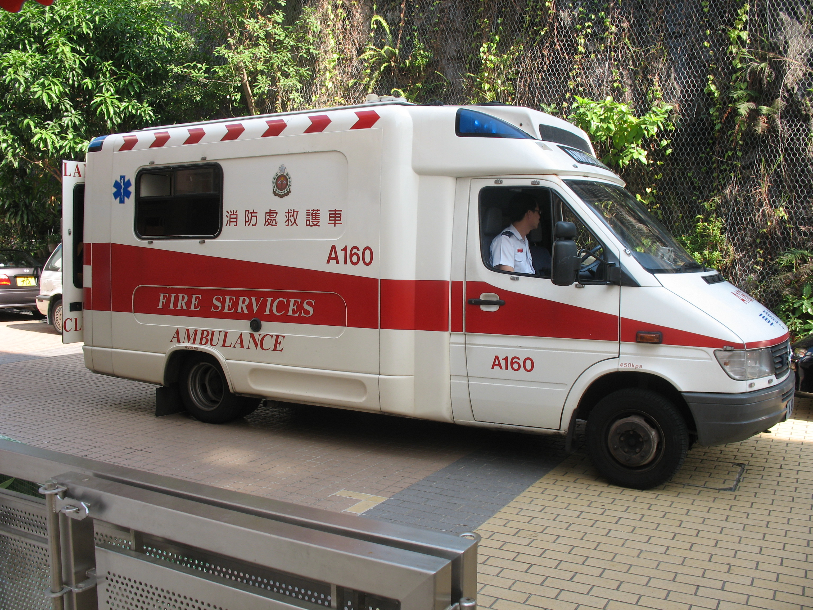 Hong Kong FSD Amblance 香港消防處救護車